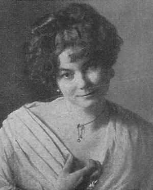 Julie Virginie Scheuermann, c. 1912